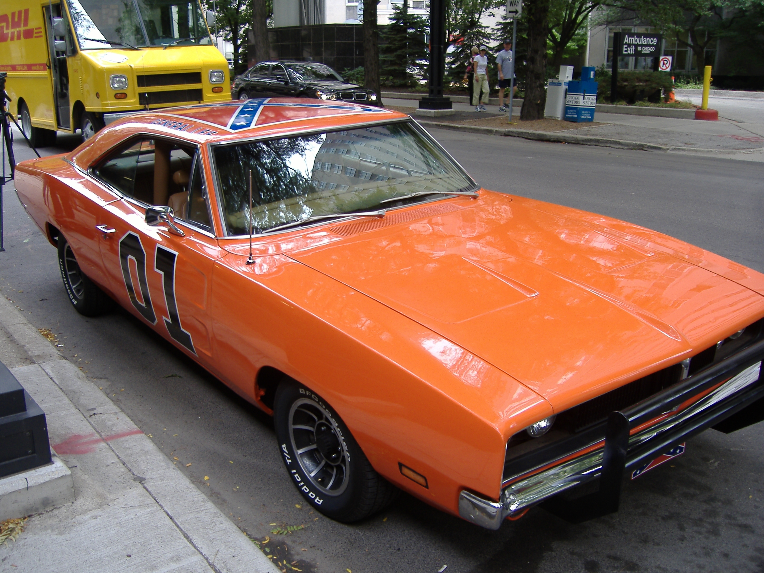 General Lee (2)